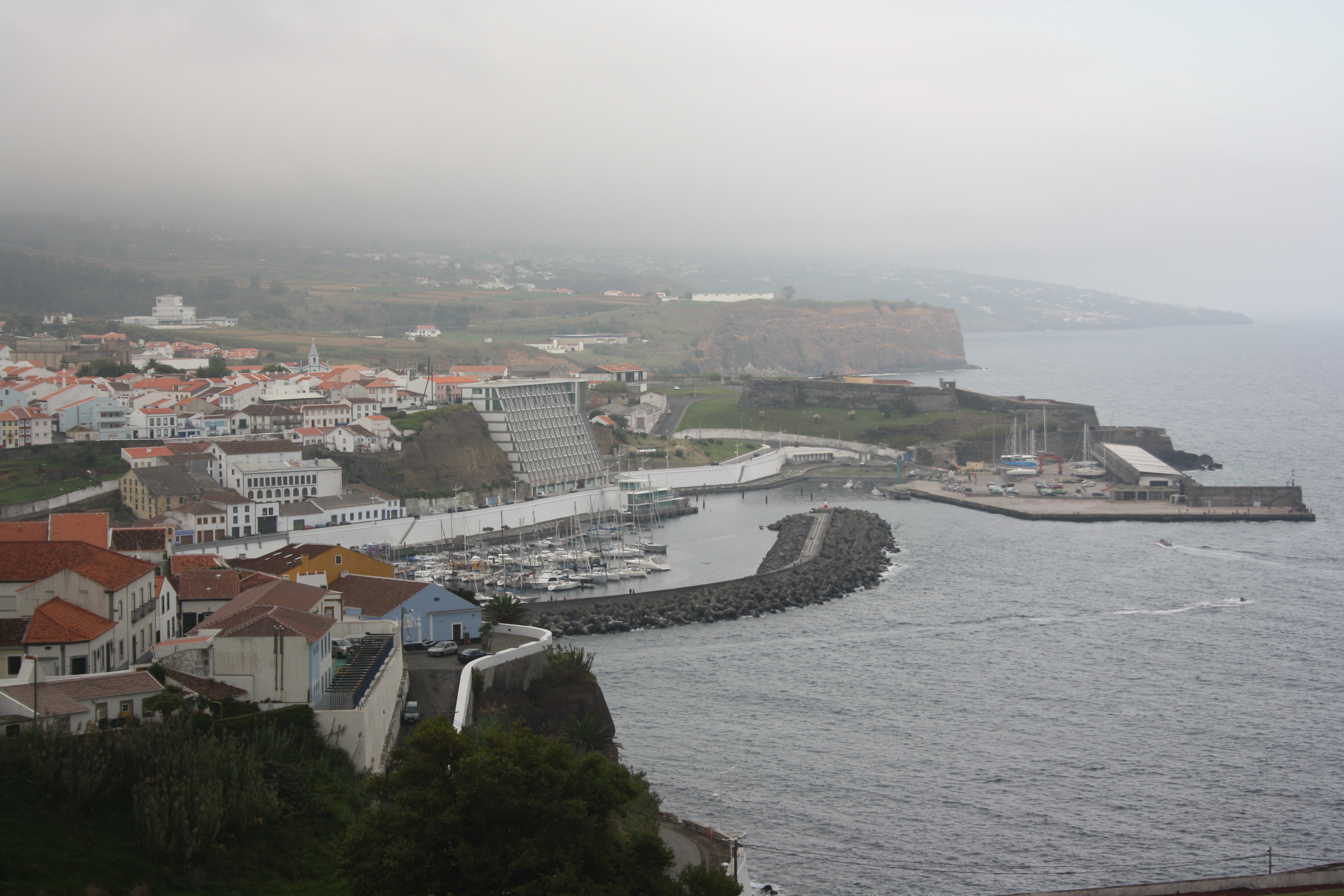 Vista da Baía de Angra desde o Castelo de São João Baptista num dia nublado. Foto tirada ao final da tarde de 29 de Setembro de 2014.